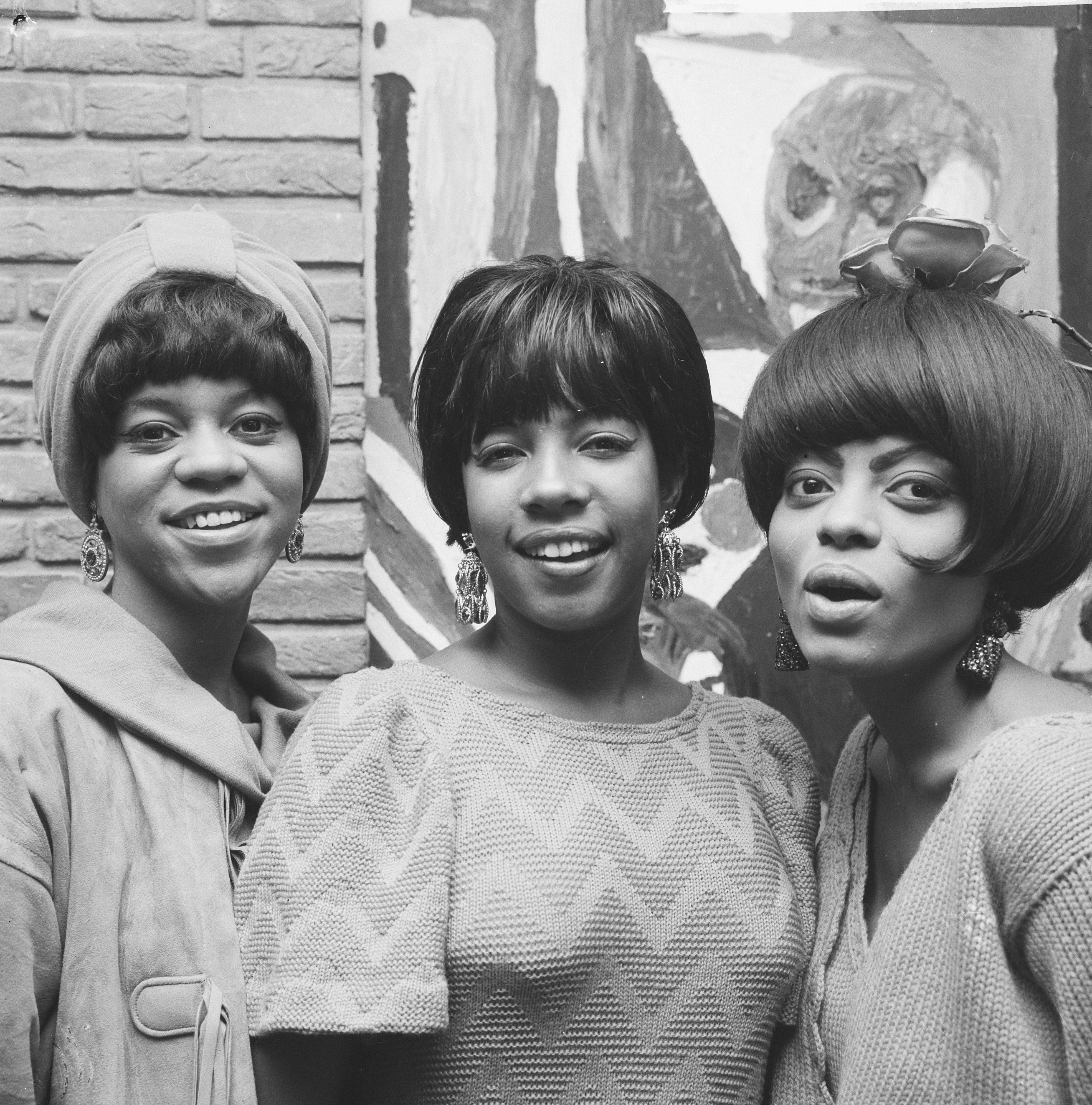 Collectie / Archief : Fotocollectie Anefo Reportage / Serie : [ onbekend ] Beschrijving : Zanggroep The Supremes in Hilton-hotel aan pers voorgesteld, v.l.n.r. Florence Ballard, Mary Wilson en Diana Ross Datum : 30 september 1965 Locatie : Amsterdam, Noord-Holland Trefwoorden : groepsportretten, muziek, popgroepen, zangeressen Persoonsnaam : Ballard, Florence, Ross, Diana, Wilson, Mary Fotograaf : Nijs, Jac. de / Anefo Auteursrechthebbende : Nationaal Archief Materiaalsoort : Negatief (zwart/wit) Nummer archiefinventaris : bekijk toegang 2.24.01.03 Bestanddeelnummer : 918-2470